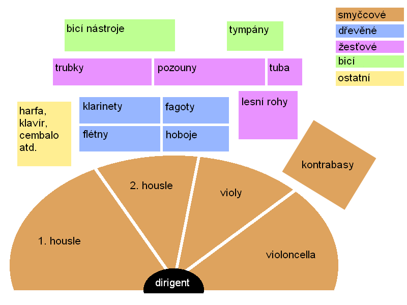 jedno z možných rozesazení symfonického orchestru